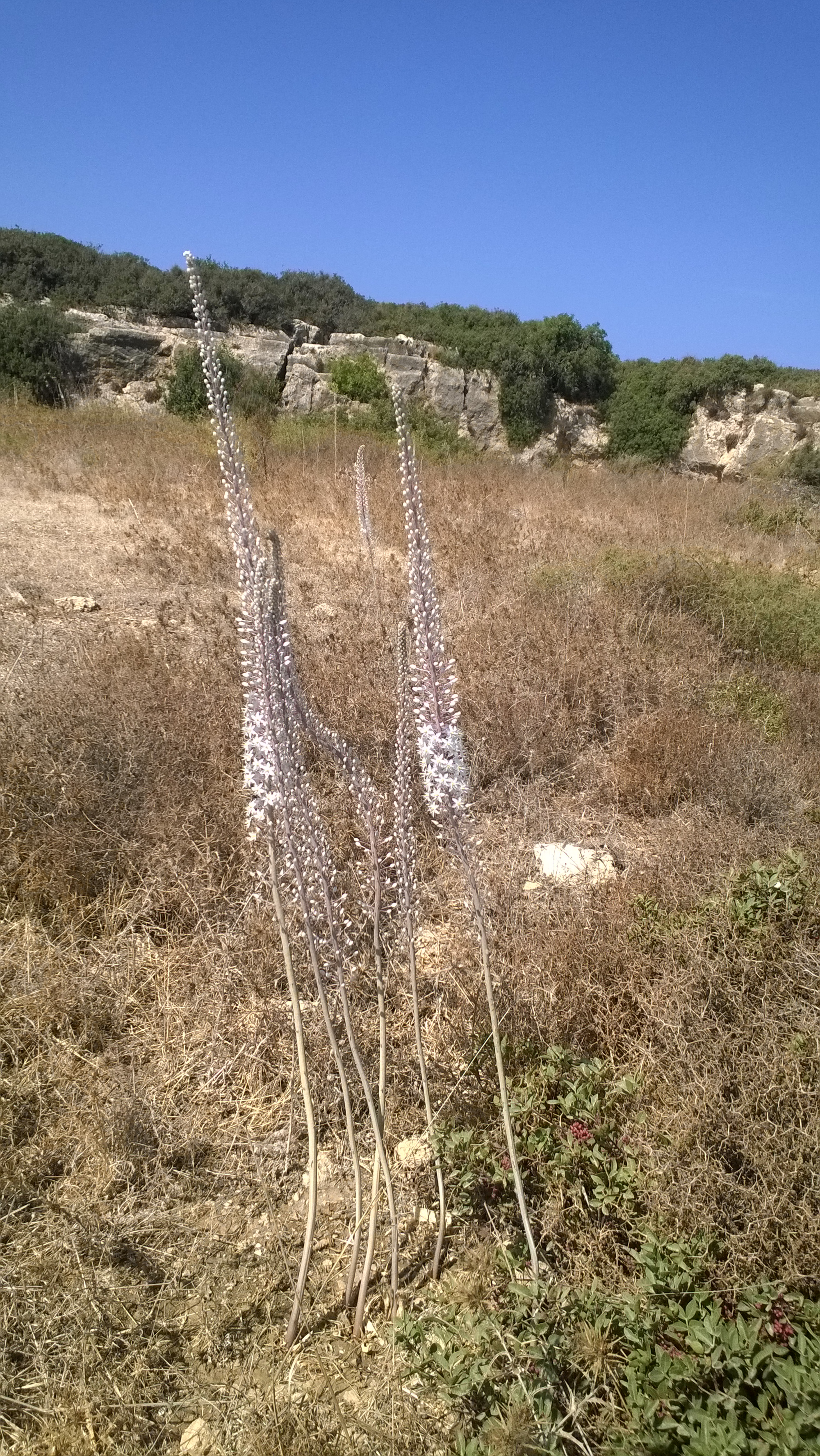 מבצר דטרוא הוא אתר ארכאולוגי בישראל בתחום שמורת טבע חורבת קרתא בסמוך למושבה עתלית. במקום נמצאים שרידיו של מבצר צלבני, מהראשונים שבנו הצלבנים בארץ ישראל.